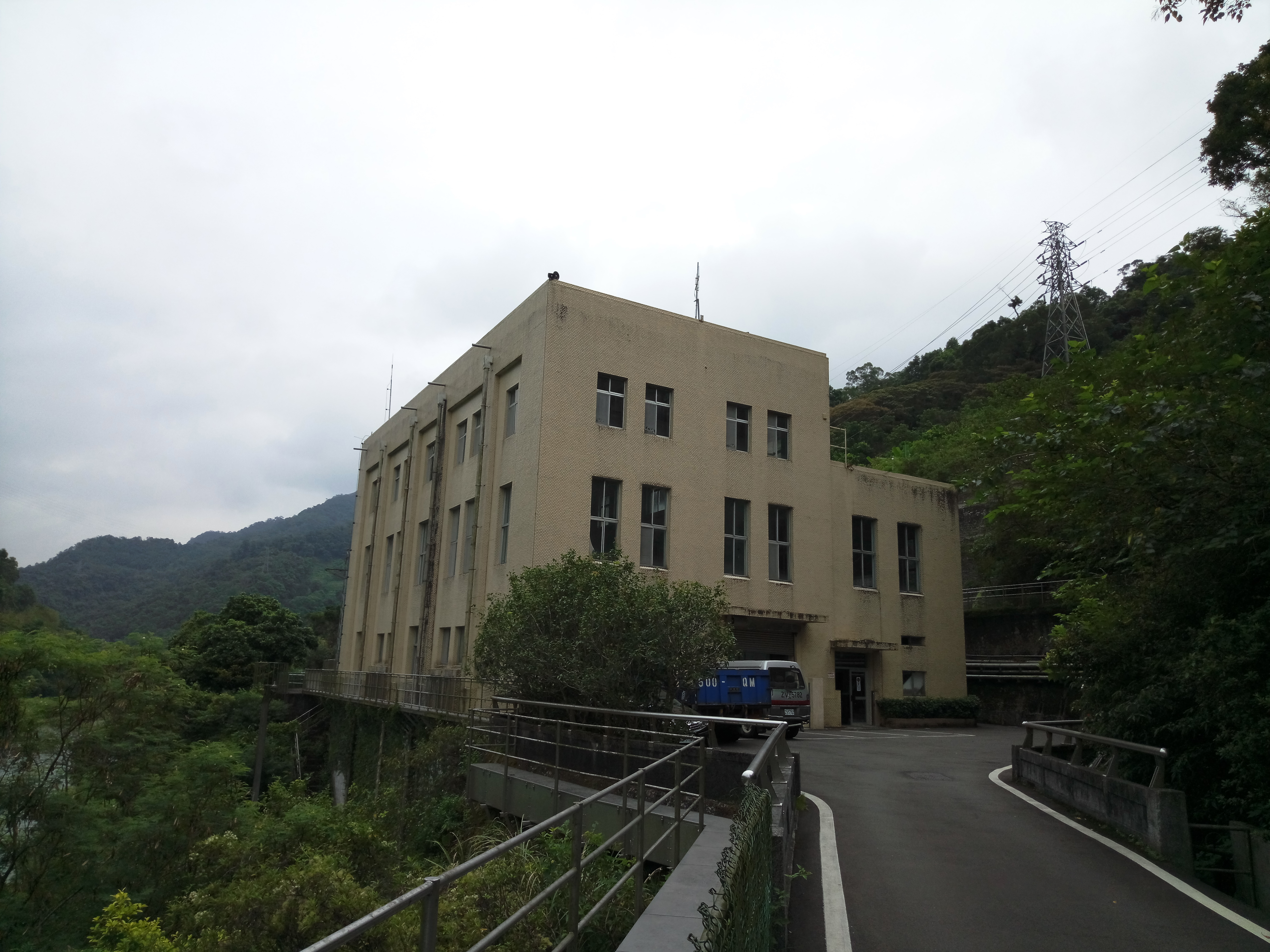 桂山發電廠桂山機組廠房外觀。